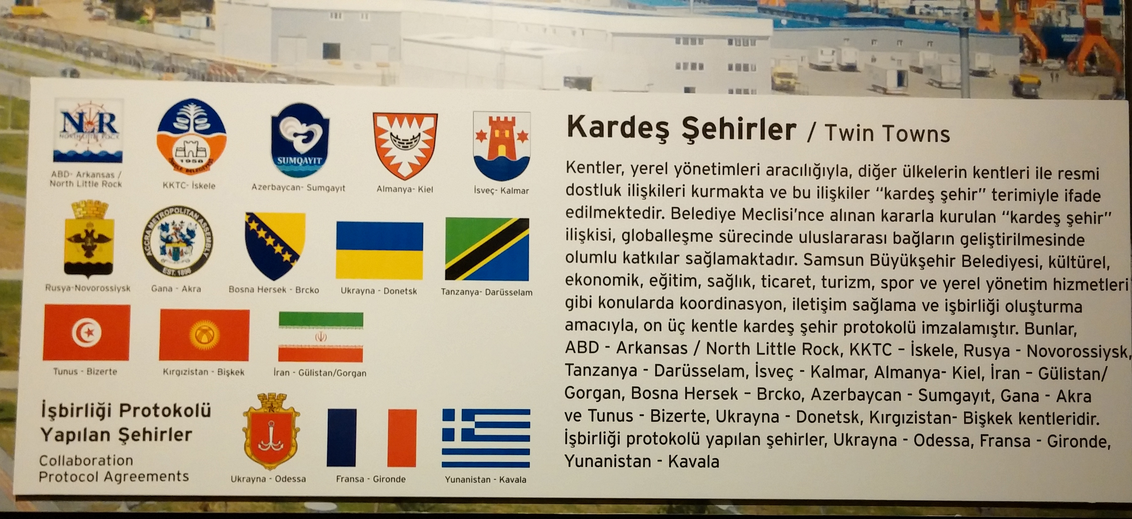 Samsun Kent Müzesi'nde yer alan kardeş şehirler bilgisi.